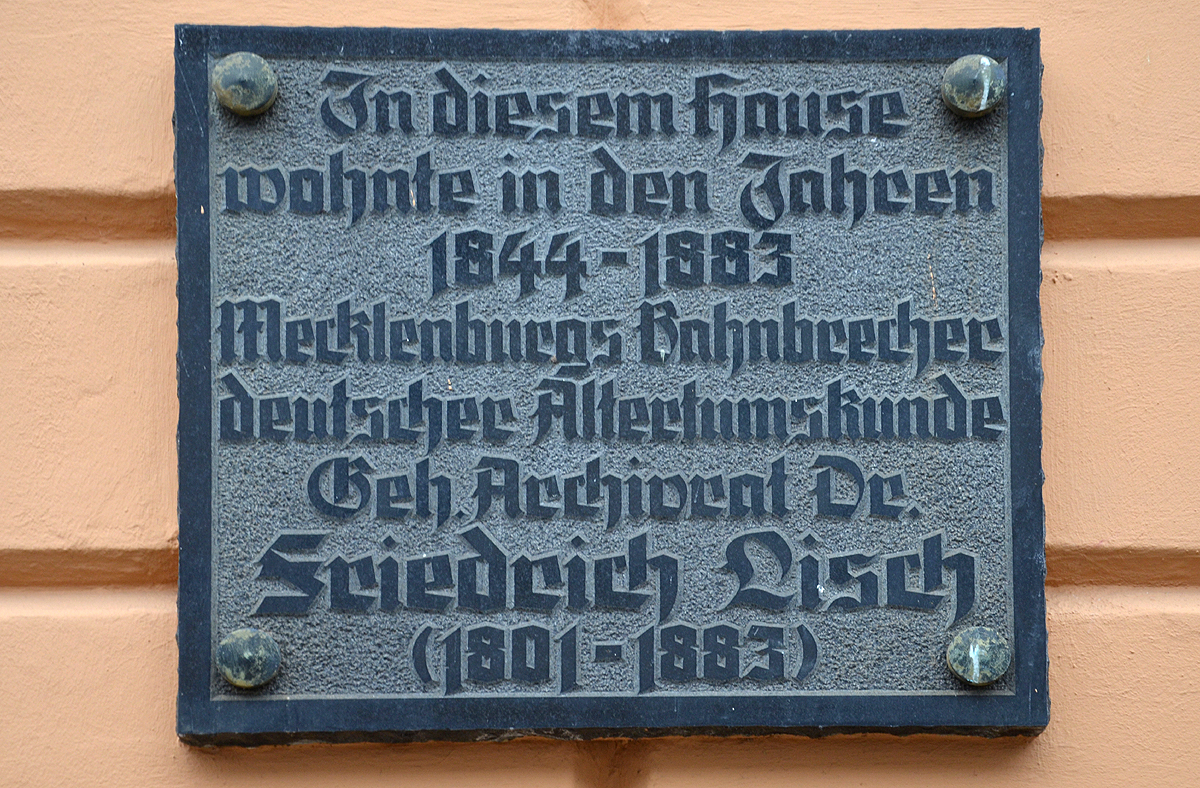 Gedenktafel am Gebäude Wismarsche Straße 147 (Achtung: falsche Hausnummer im Dateinamen) in Schwerin mit dem Text „In diesem Hause wohnte in den Jahren 1844 - 1883 Mecklenburgs Bahnbrecher deutscher Altertumskunde Geh. Archivrat Dr. Friedrich Lisch (1801 - 1883)“ ...